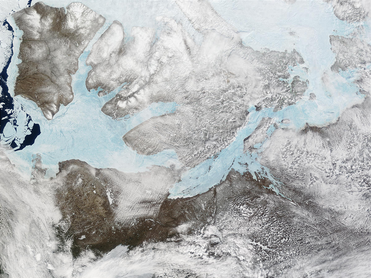 Banks-Insel und Victoria-Insel, Kanada